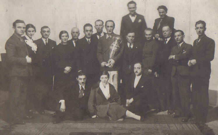 אלברט מיכאל בחברת עובדי בנק גאולה בסופיה